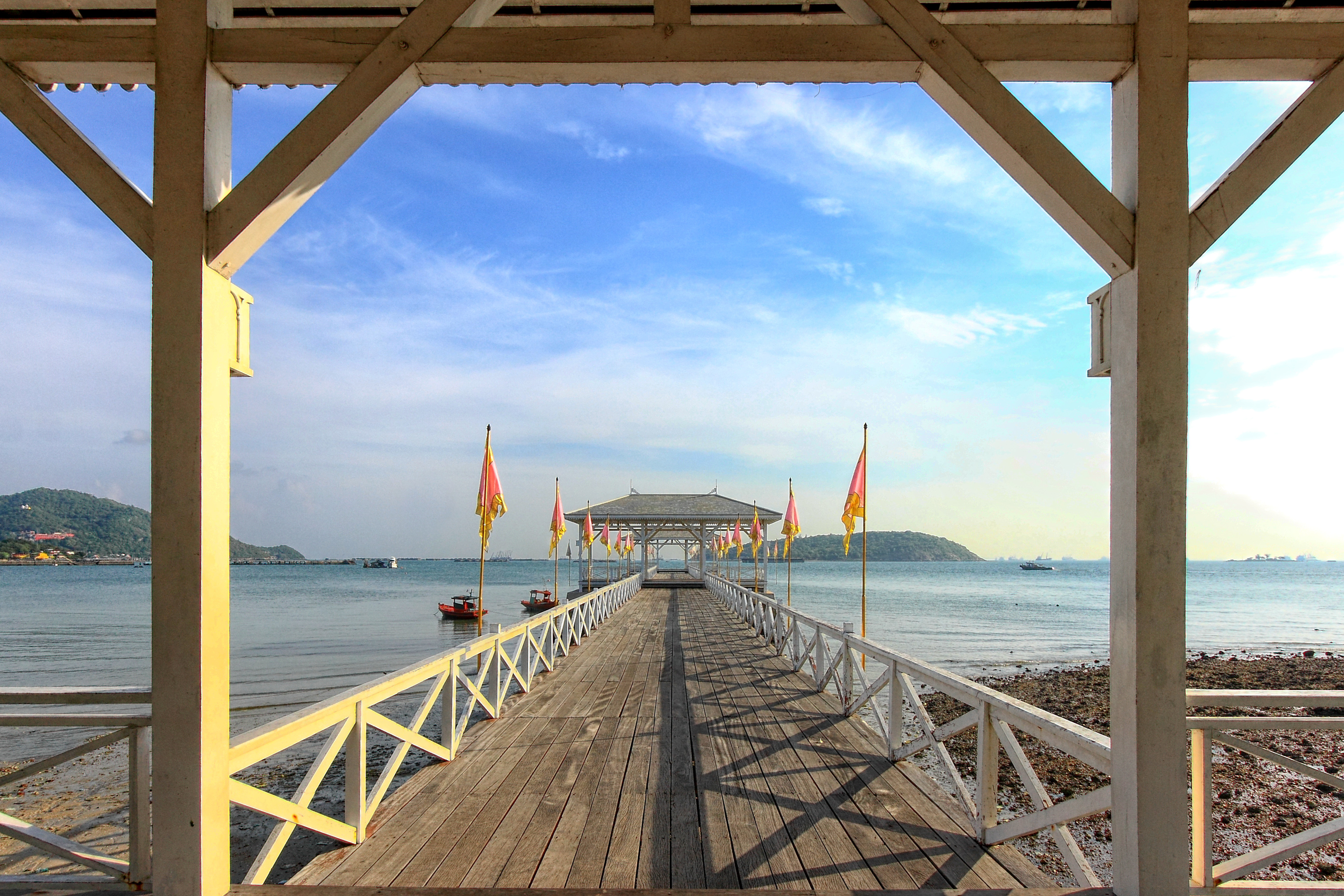 พระจุฑาธุชราชฐาน ตั้งอยู่ ณ เกาะสีชัง จังหวัดชลบุรี อดีตเคยเป็นพระราชวังฤดูร้อนในพระบาทสมเด็จพระจุลจอมเกล้าเจ้าอยู่หัว หลังจากเหตุการณ์วิกฤต ร.ศ.112 ก็สิ้นสุดการเป็นเขตพระราชฐาน และมีหน่วยงานราชการต่าง ๆ มาขอใช้พื้นที่ ปัจจุบัน จุฬาลงกรณ์มหาวิทยาลัยขอใช้พื้นที่บางส่วนเพื่อเป็นสถานีวิจัยวิทยาศาสตร์ทางทะเลและศูนย์ฝึกนิสิต และทำหน้าที่ดูแลรักษาพระจุฑาธุชราชฐานไปในคราวเดียวกัน